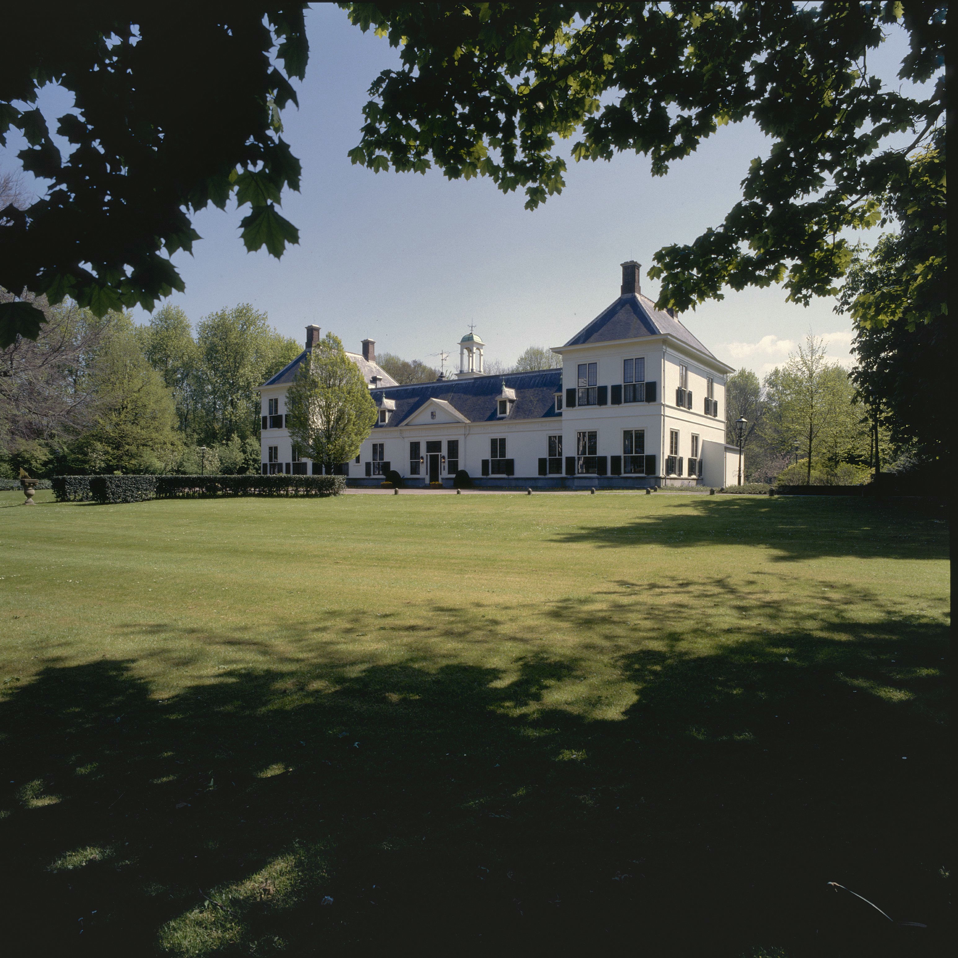 Zorgvliet: Overzicht voorgevel en rechter zijgevel (opmerking: Gefotografeerd voor Kastelen en Buitenplaatsen in Zuid-Holland)